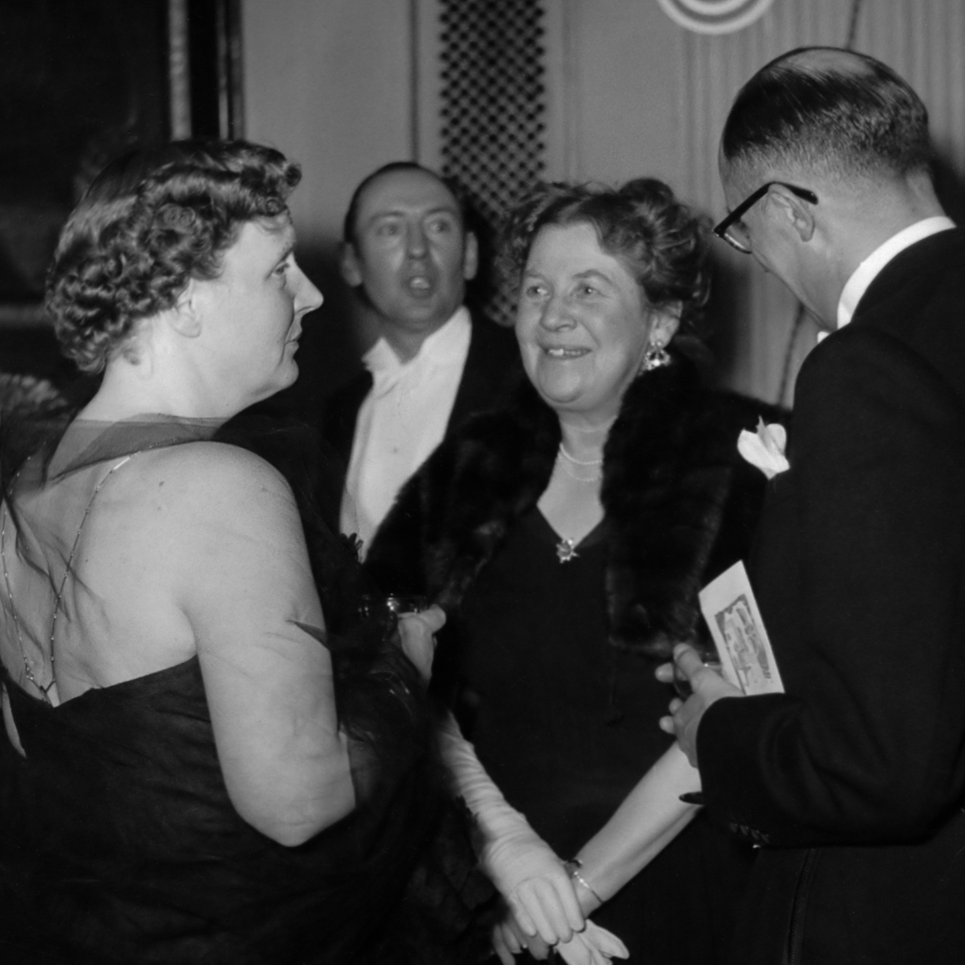 koninklijk huis, koninginnen, festiviteiten, auteurs, Boekenweek, Juliana, koningin, Naeff, Top 22 februari 1952